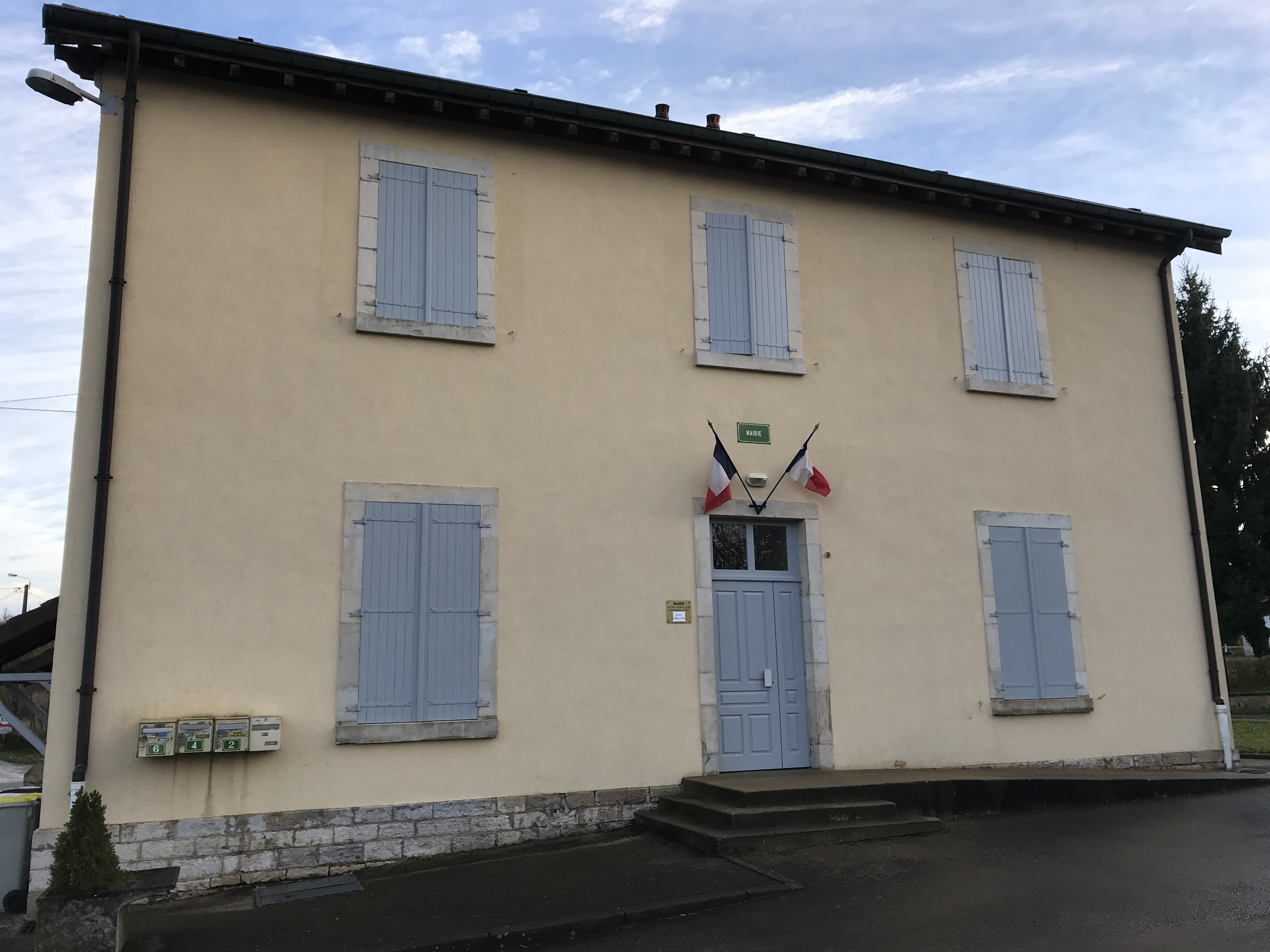 Plumont en janvier 2018.